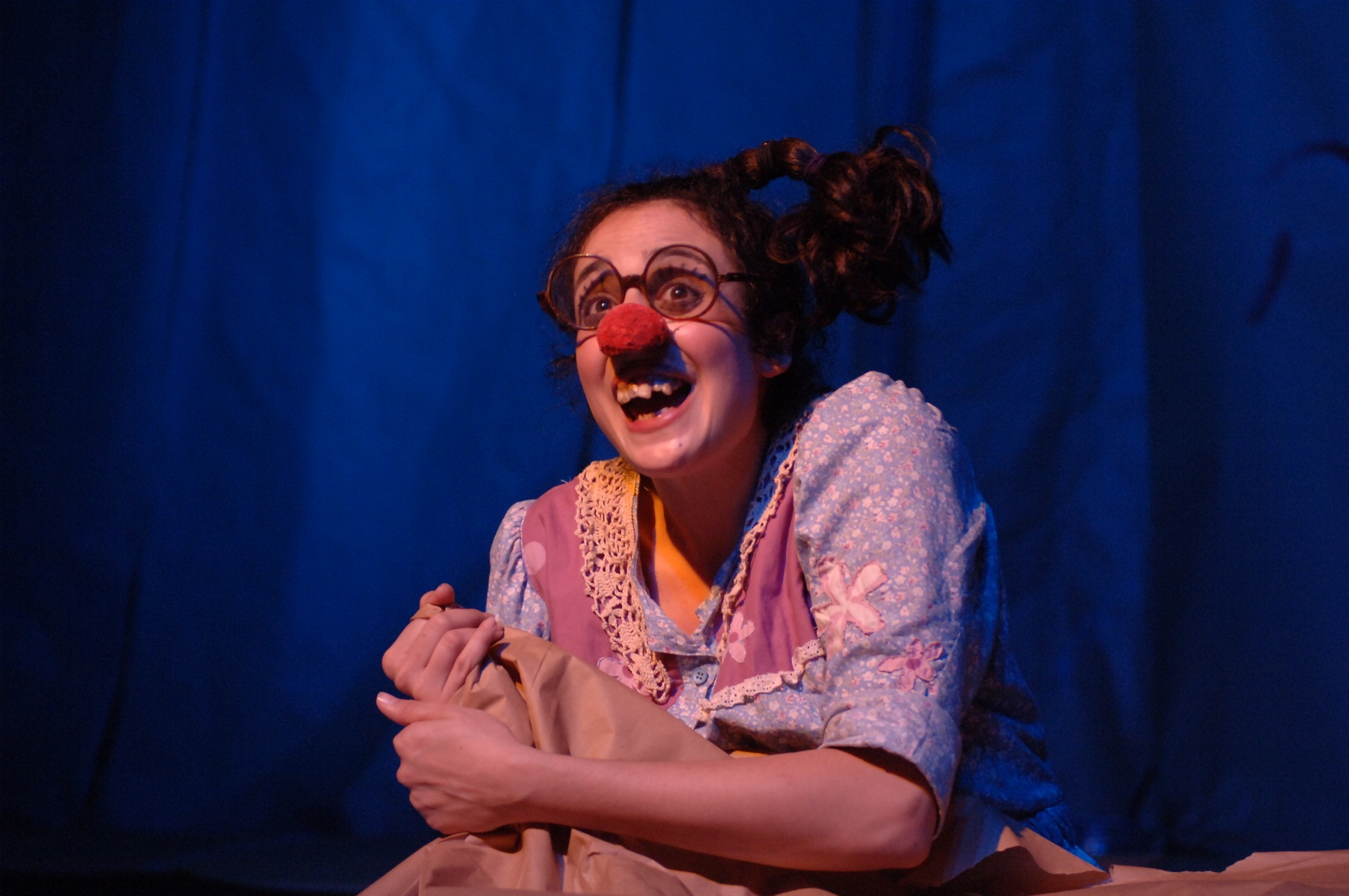 נטע שפיגלמן ביאקיש ופופצ'ה